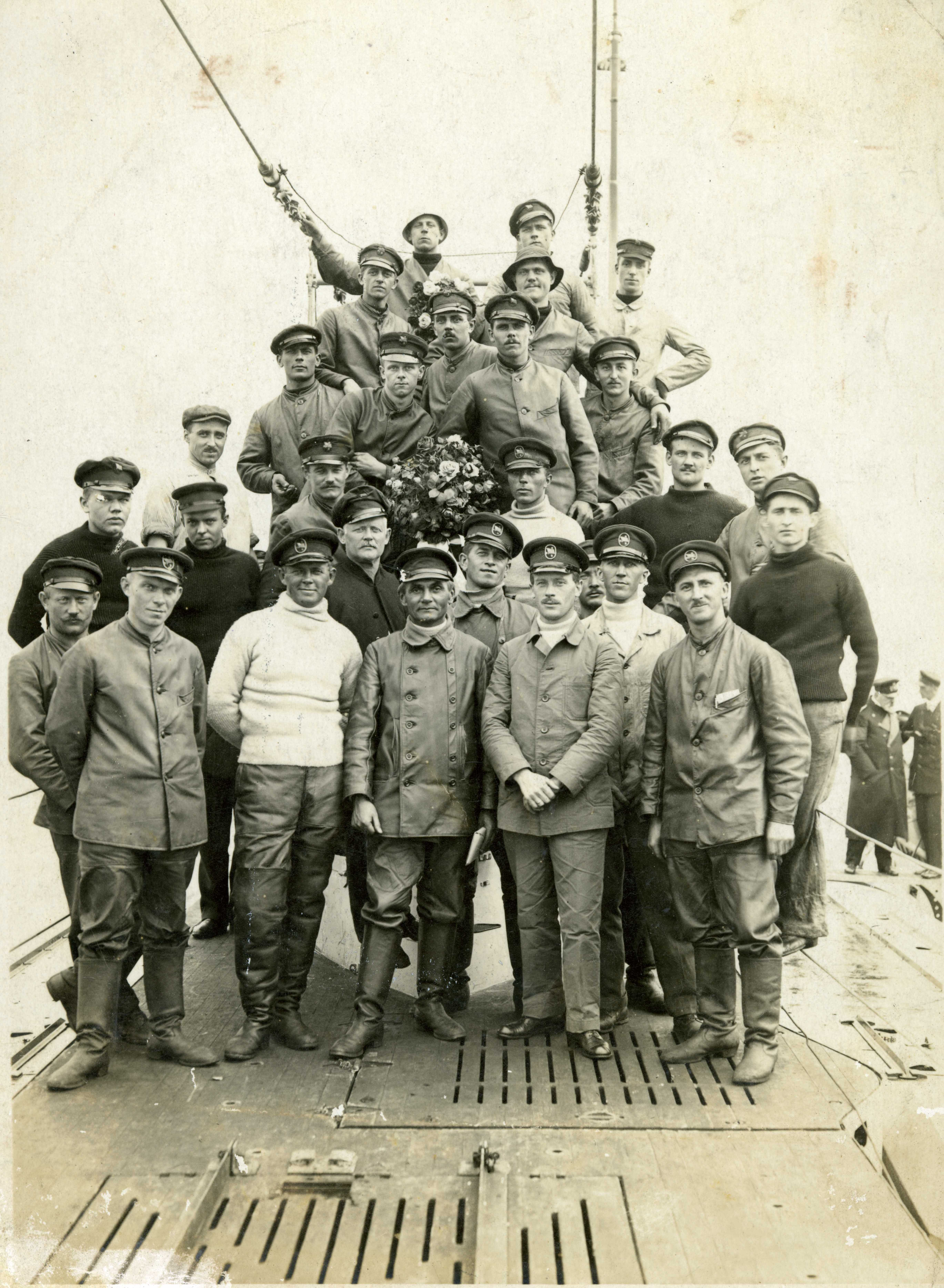 Begrüßung der Besatzung des Handels-U-Boots "Deutschland" in Bremen durch Admiral Schröder nach der Rückkehr von ihrer ersten Amerika-Fahrt